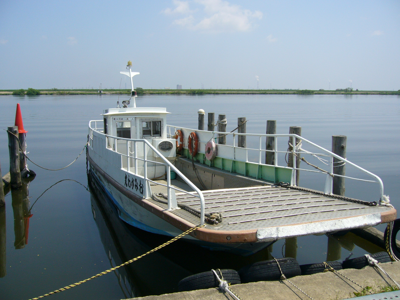 tomita-ferry,katori-city,japan